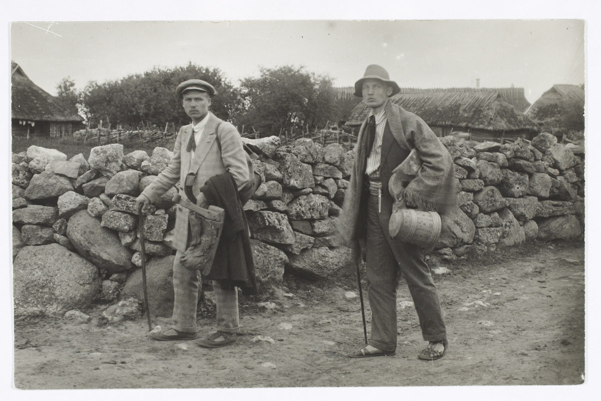 ERM Fk 532:1